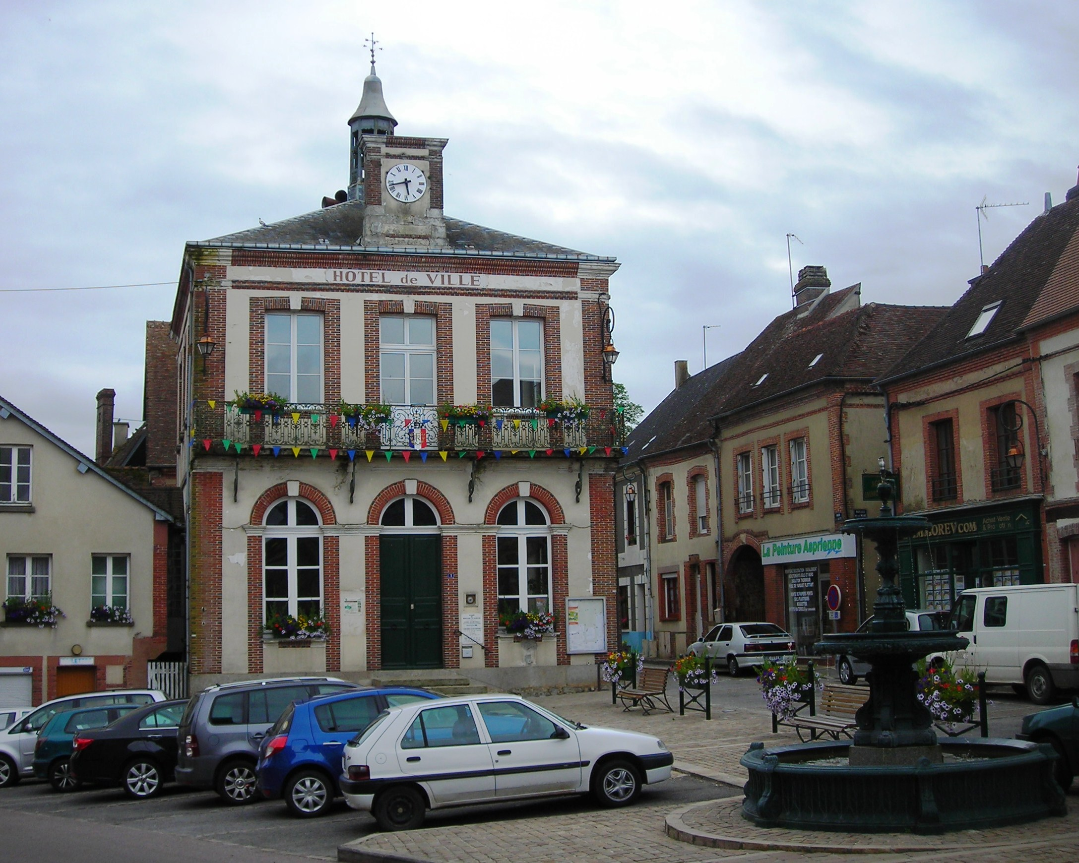 Hotel de ville de Moulins-la-Marche (Orne, France).